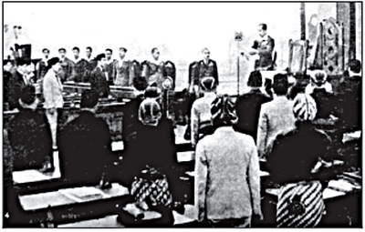 Sidang Resmi Pertama "Badan Penyelidik Usaha Persiapan Kemerdekaan Indonesia" (BPUPKI).